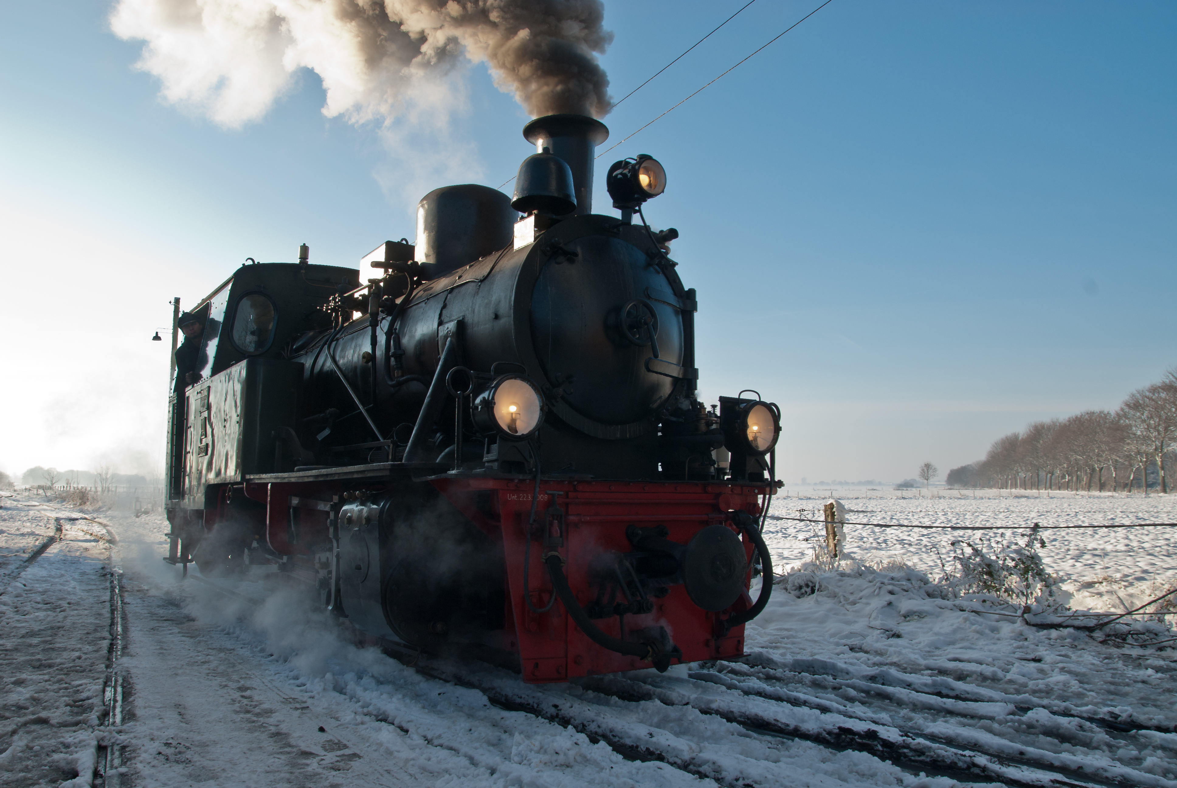 Lok 20 ("Haspe") der Interessengemeinschaft Historischer Schienenverkehr (Selfkantbahn) bei einer Rangierfahrt im Bw-Bereich des Bahnhofes Schierwaldenrath